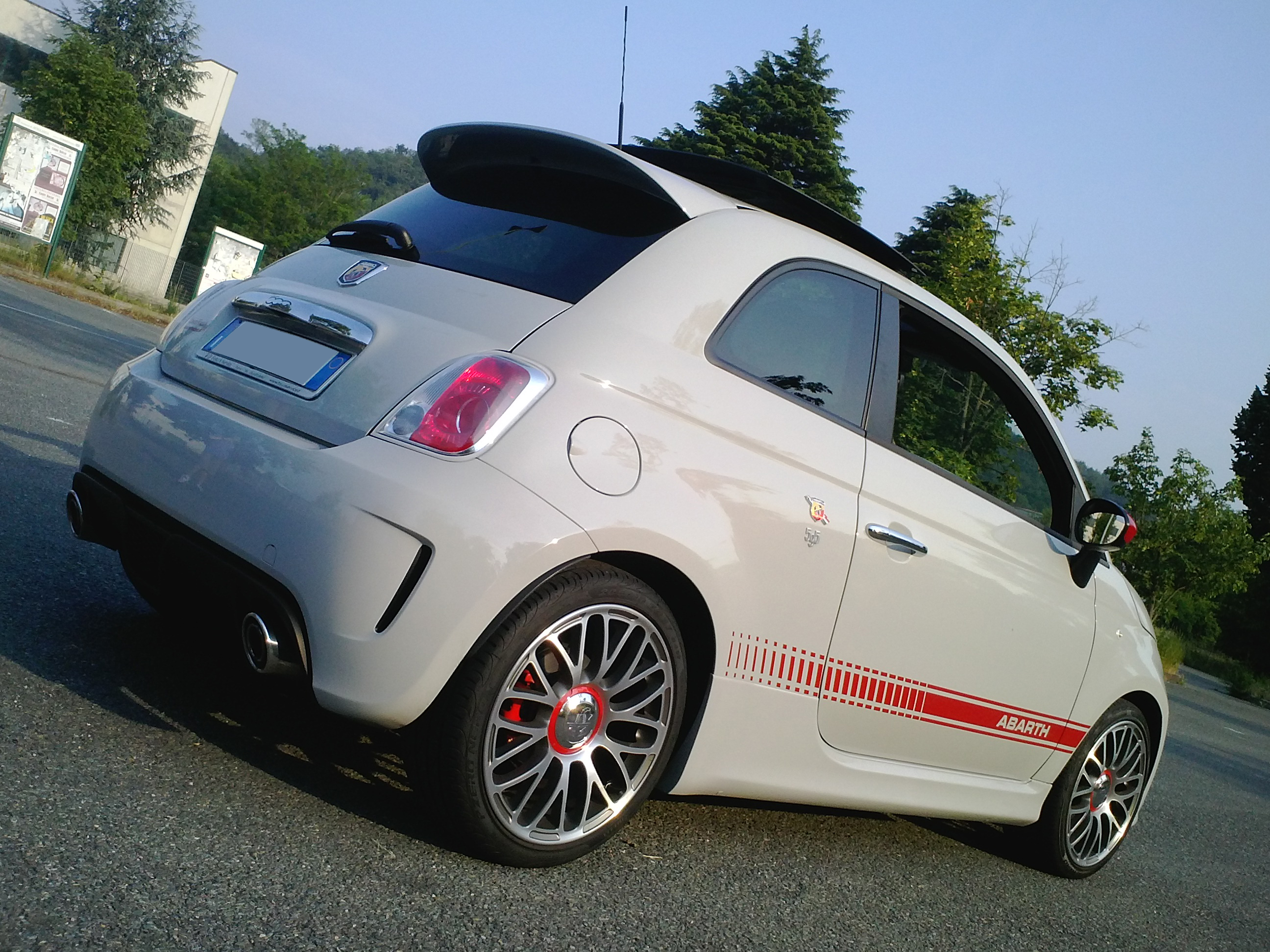 Abarth 595 Elaborazione